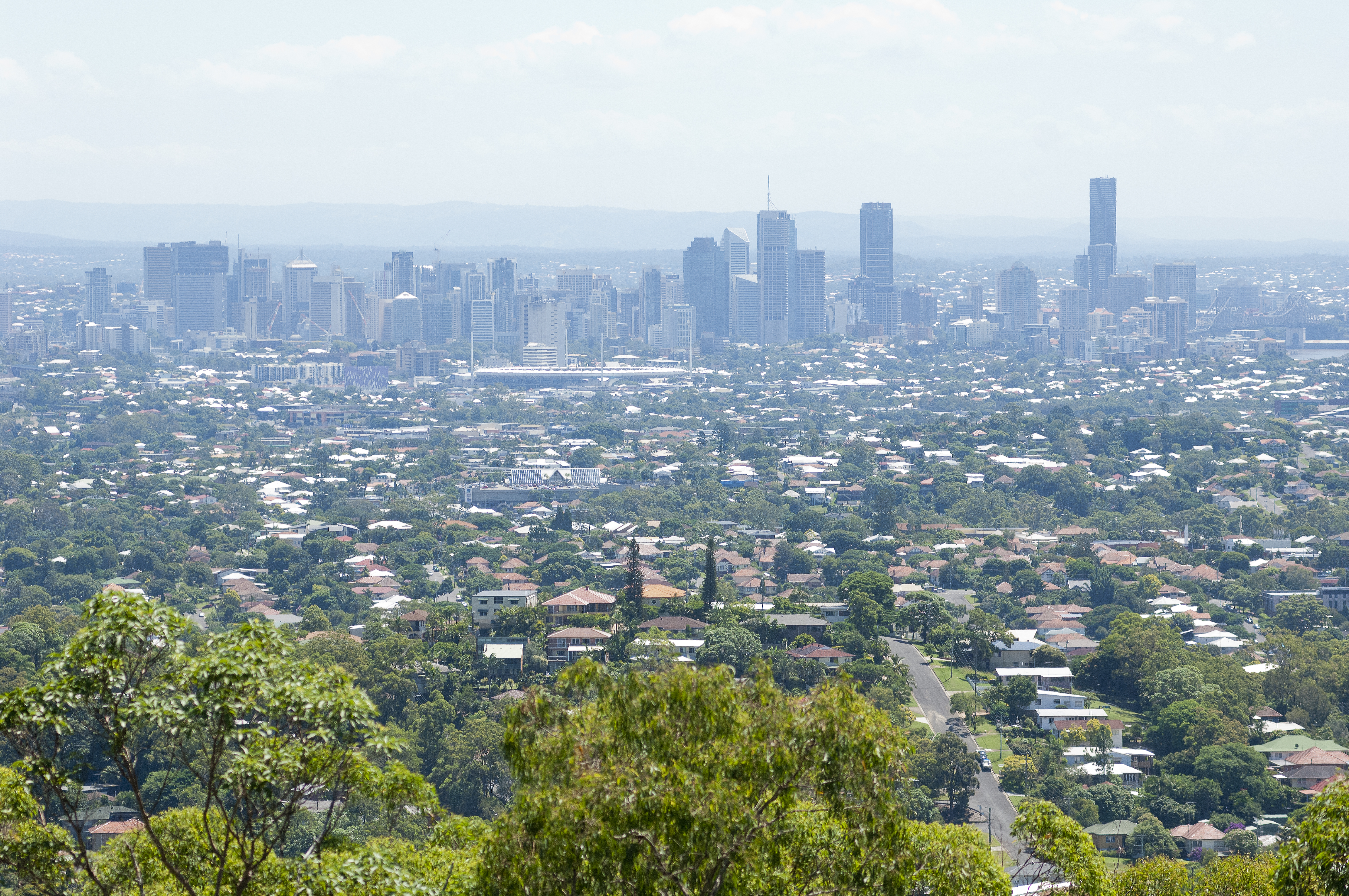 Mt Gravatt Outlook